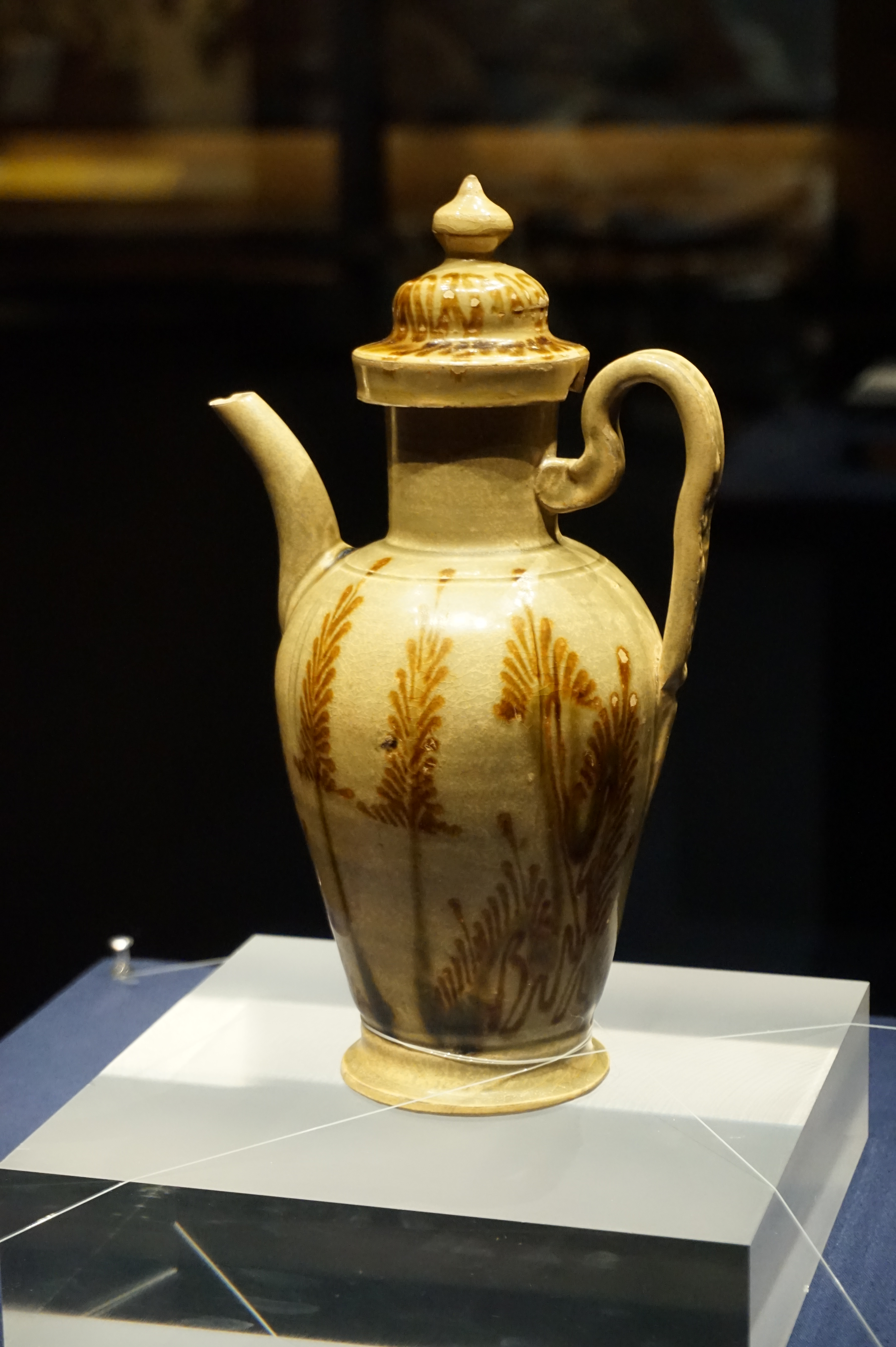 北宋瓯窑青釉蕨草纹瓷执壶。温州博物馆藏。